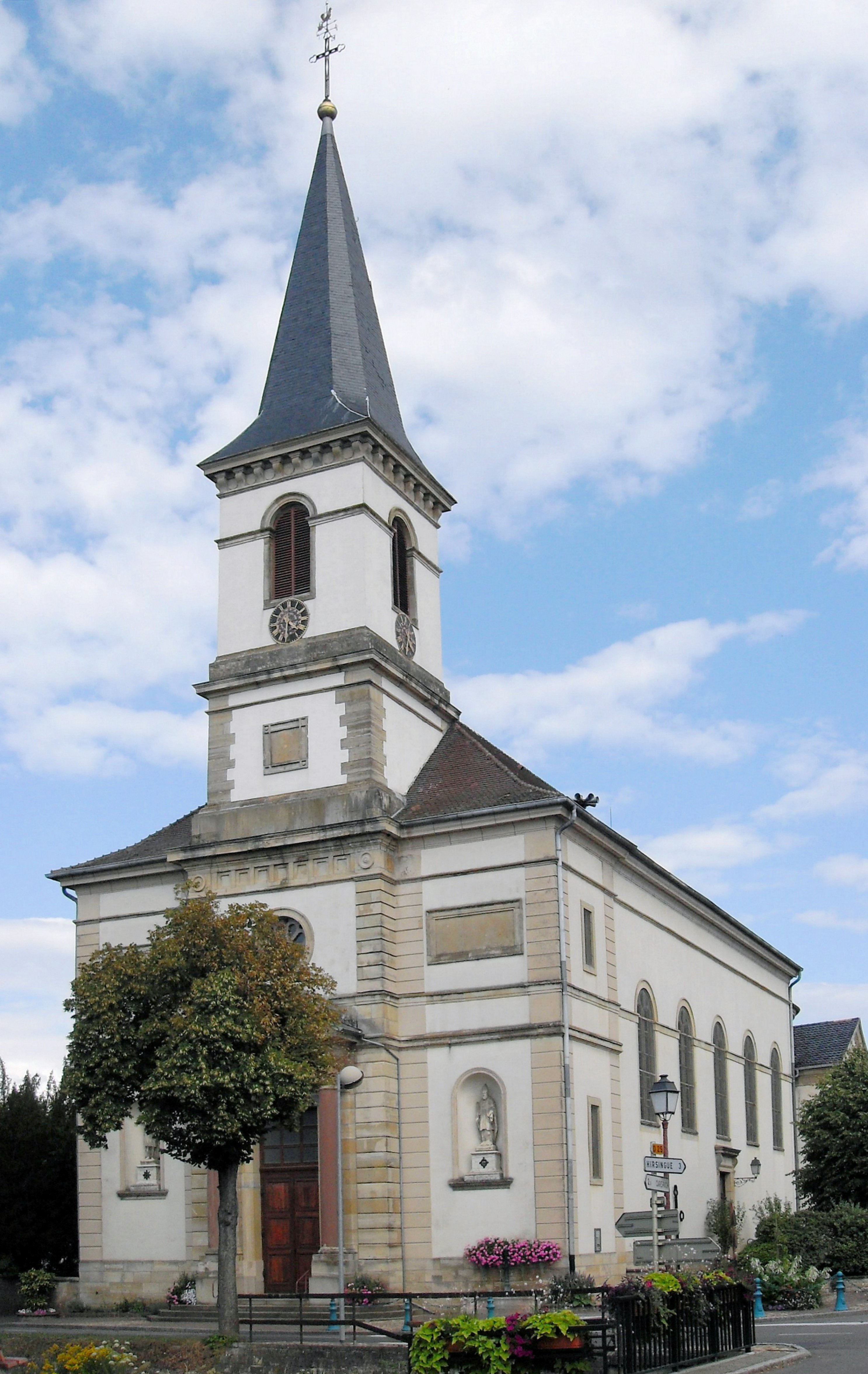 L'eglise Saint-Maurice à Hirtzbach